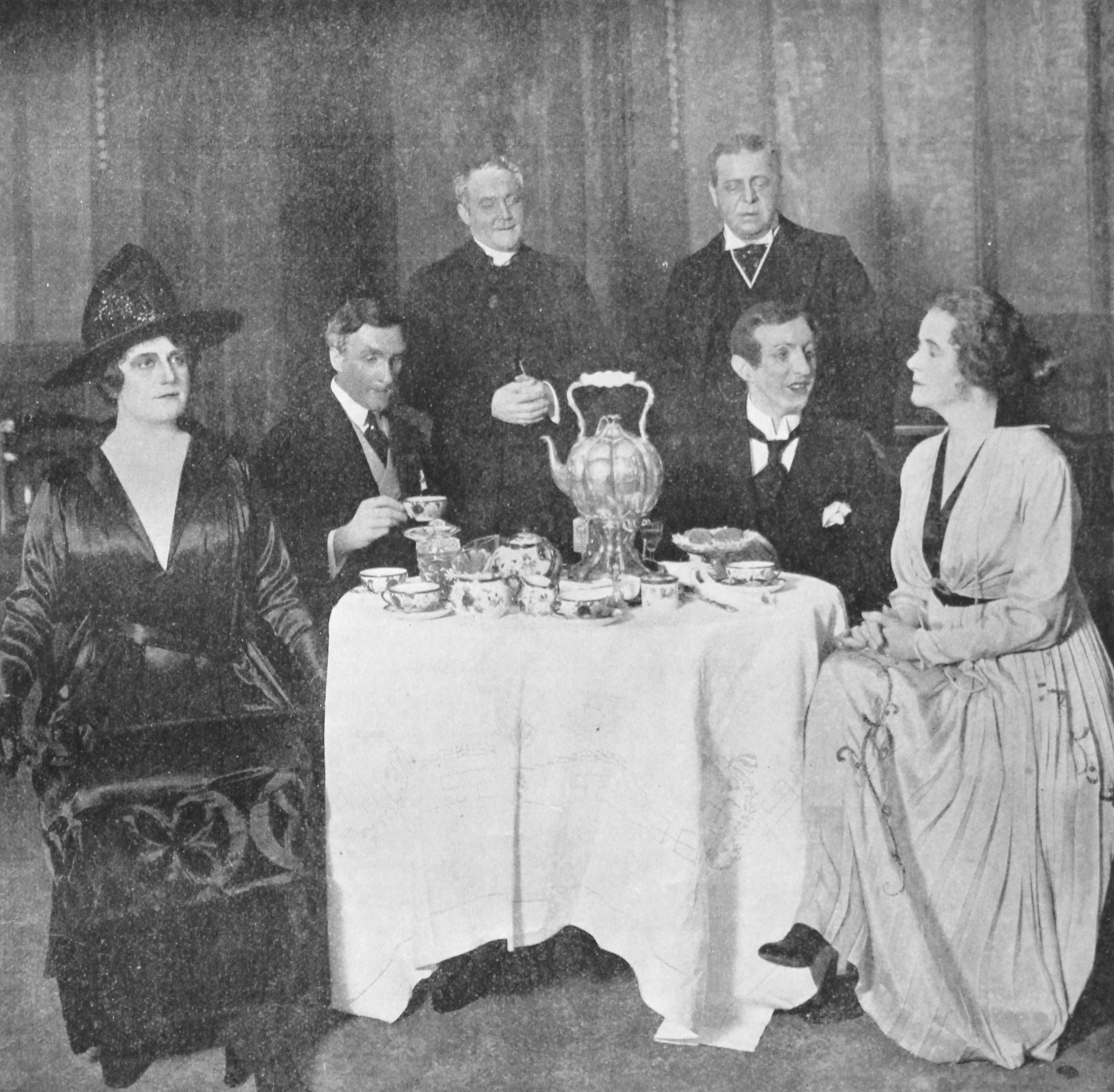 Langdon Mitchells Äktenskapskarusellen (The New Marriage) på Vasateatern i Stockholm 1918. Fr.v. Lisa Ranft som Vida Phillimore, Olof Winnerstrand som John Karslake, Hugo Tranberg som pastor Matthew Phillimore, Fredrik Hedlund som Philip Phillimore, Erik Petschler som Sir Wilfred Gatesderby och Frida Winnerstrand som Cynthia Karslake.